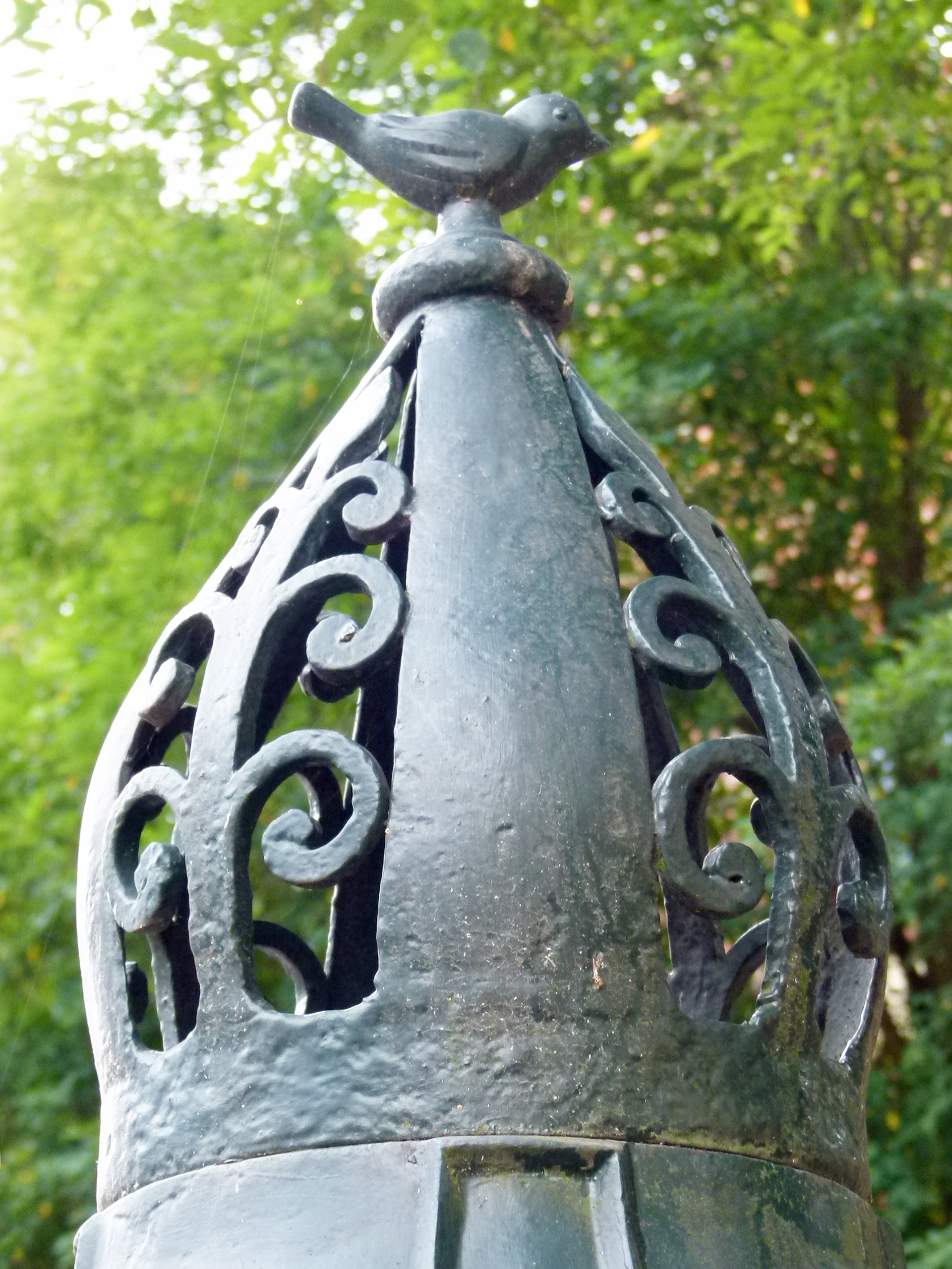 Handschwengelpumpe, Lobstädter Straße, bei Nr. 12, Ecke Ernst-Toller-Straße, Leipzig